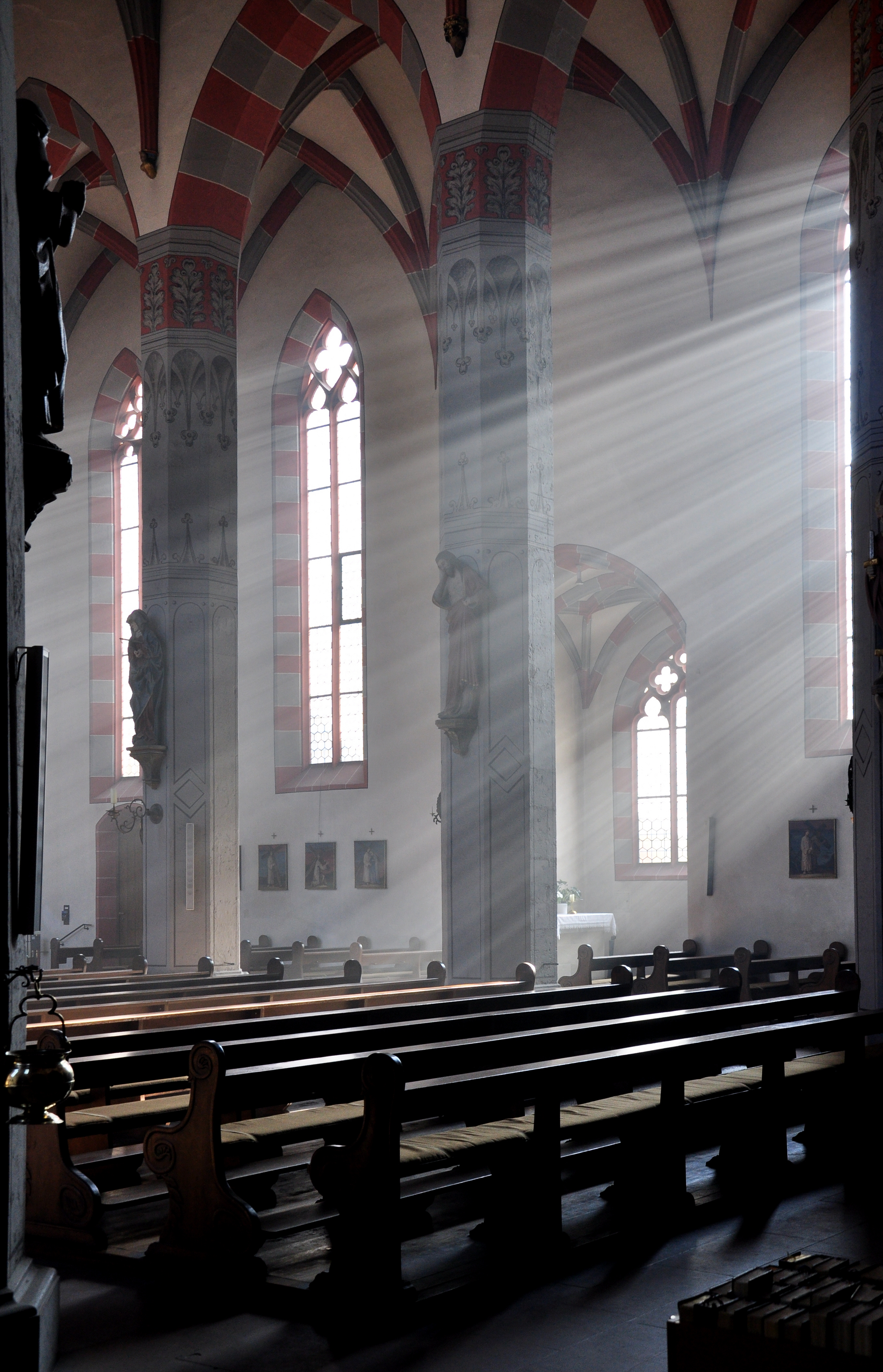 Ochsenfurt, Katholische Stadtpfarrkirche St. Andreas, Innenansicht mit durch die weihrauchgesättigte Luft einfallendem Licht